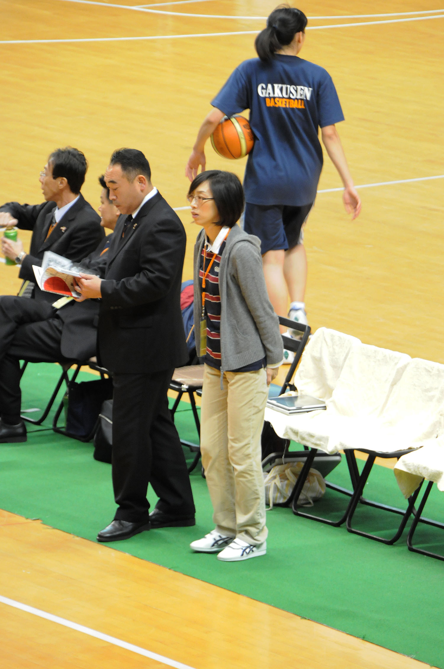 トヨタ紡織サンシャインラビッツ、金銀暎アシスタントコーチ。東京体育館で。